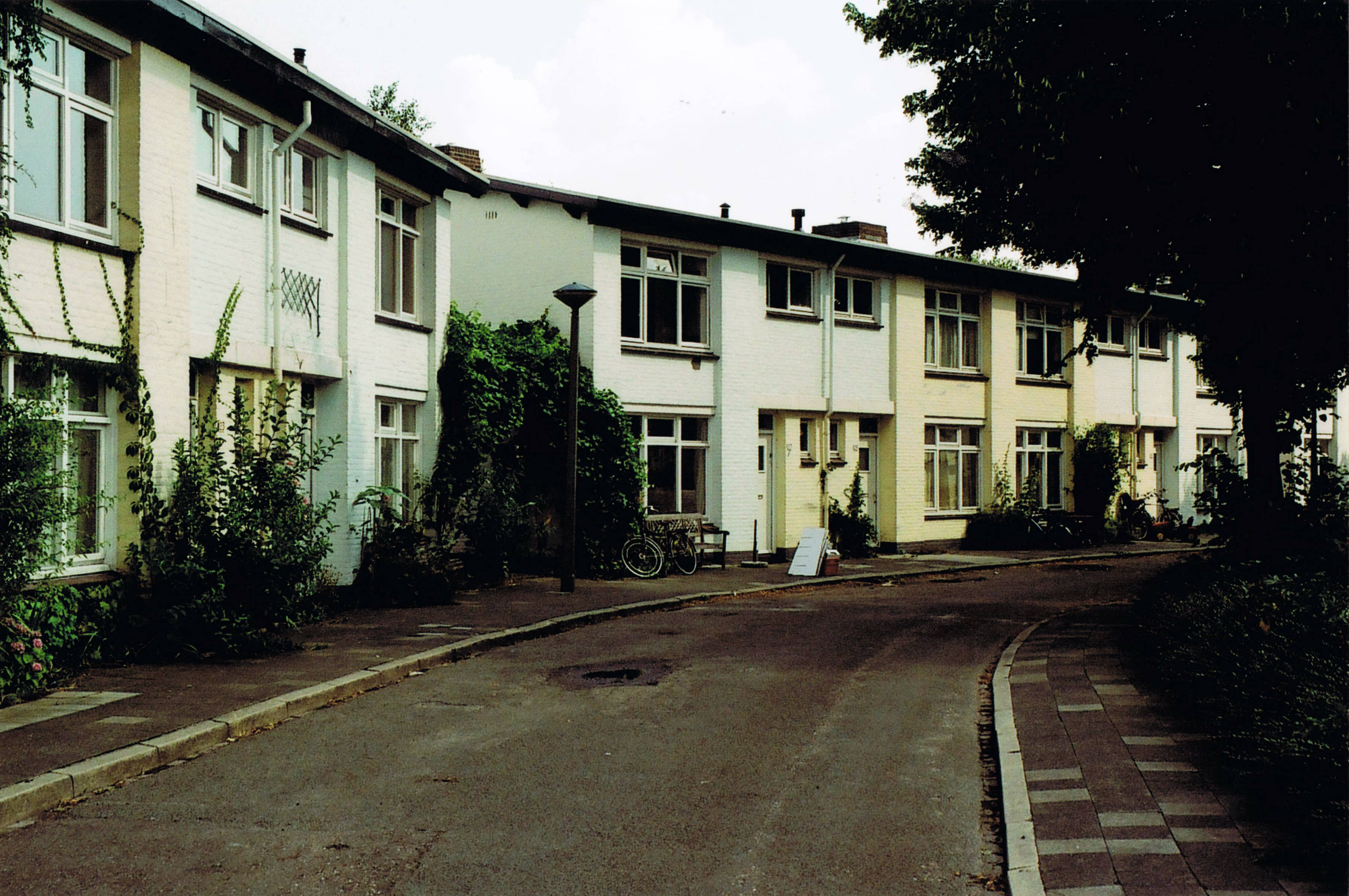 Maastricht 2007: Woonschool De Ravelijn. Gebouwd 1953-56 naar een ontwerp van Frans Dingemans (stedebouwkundig plan) en Jos Muré (architectuur).